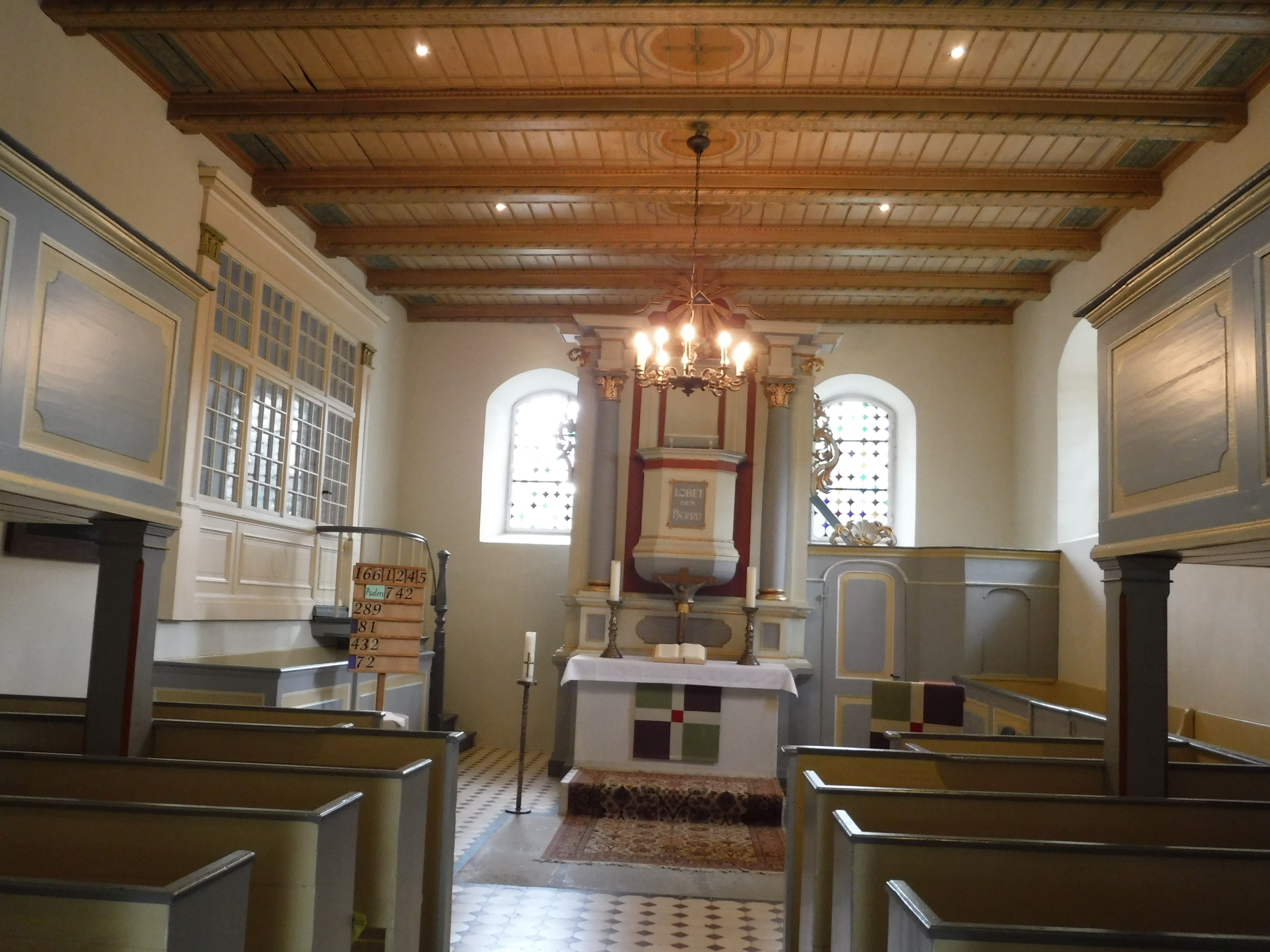 Innenraum der Dorfkirche Genshagen mit Loge und Kanzelalta